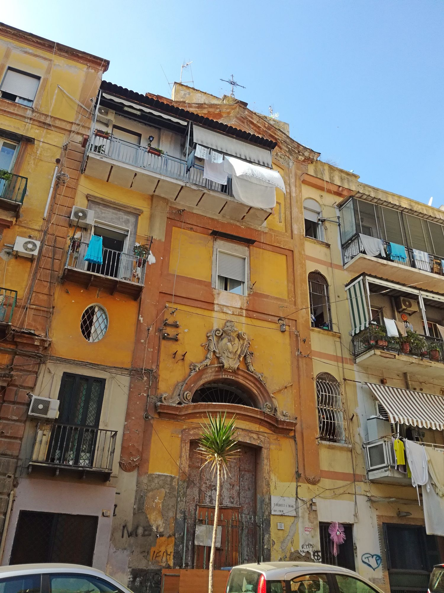 Chiesa di Sant'Arcangelo a Baiano (Napoli)